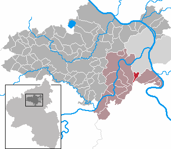 Waldesch in Rhineland-Palatinate - district Mayen-Koblenz